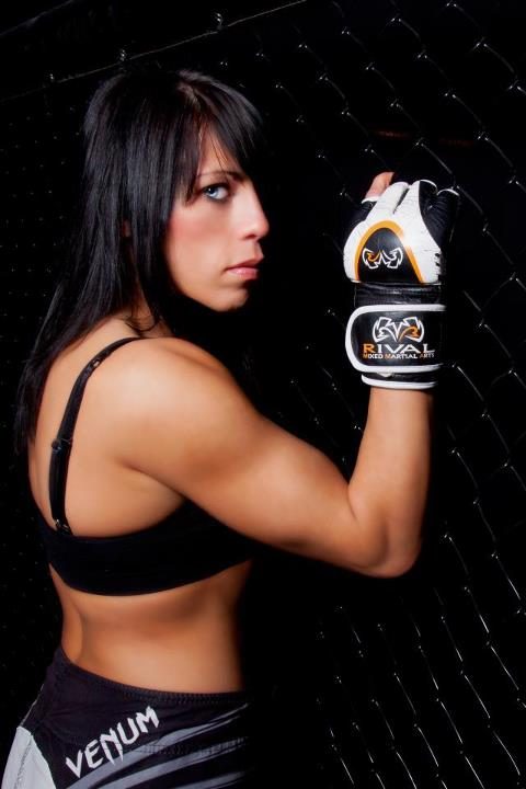 Sheila Gaff beim Shooting in Eschwege